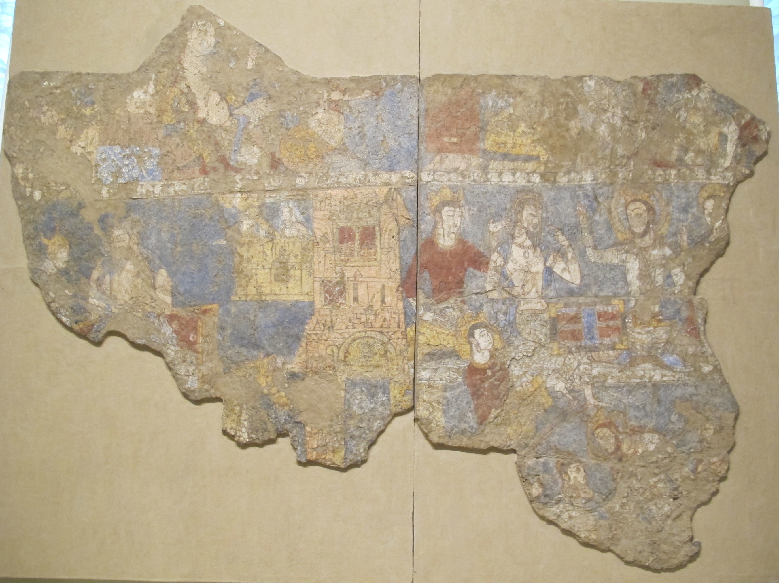 Giocatori, pittura parietale da pendjikent, settore VI, camera 13, VIII sec